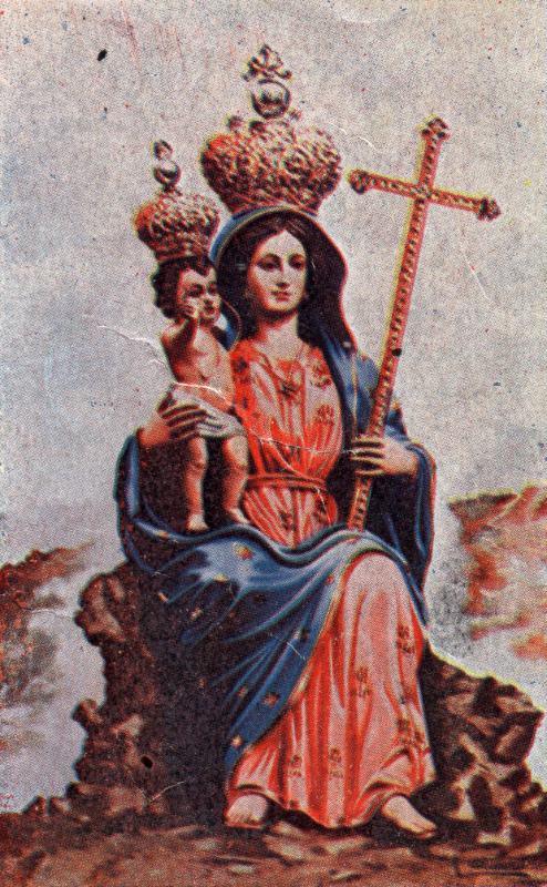 Antica immagine di Maria santissima di Gerusalemme